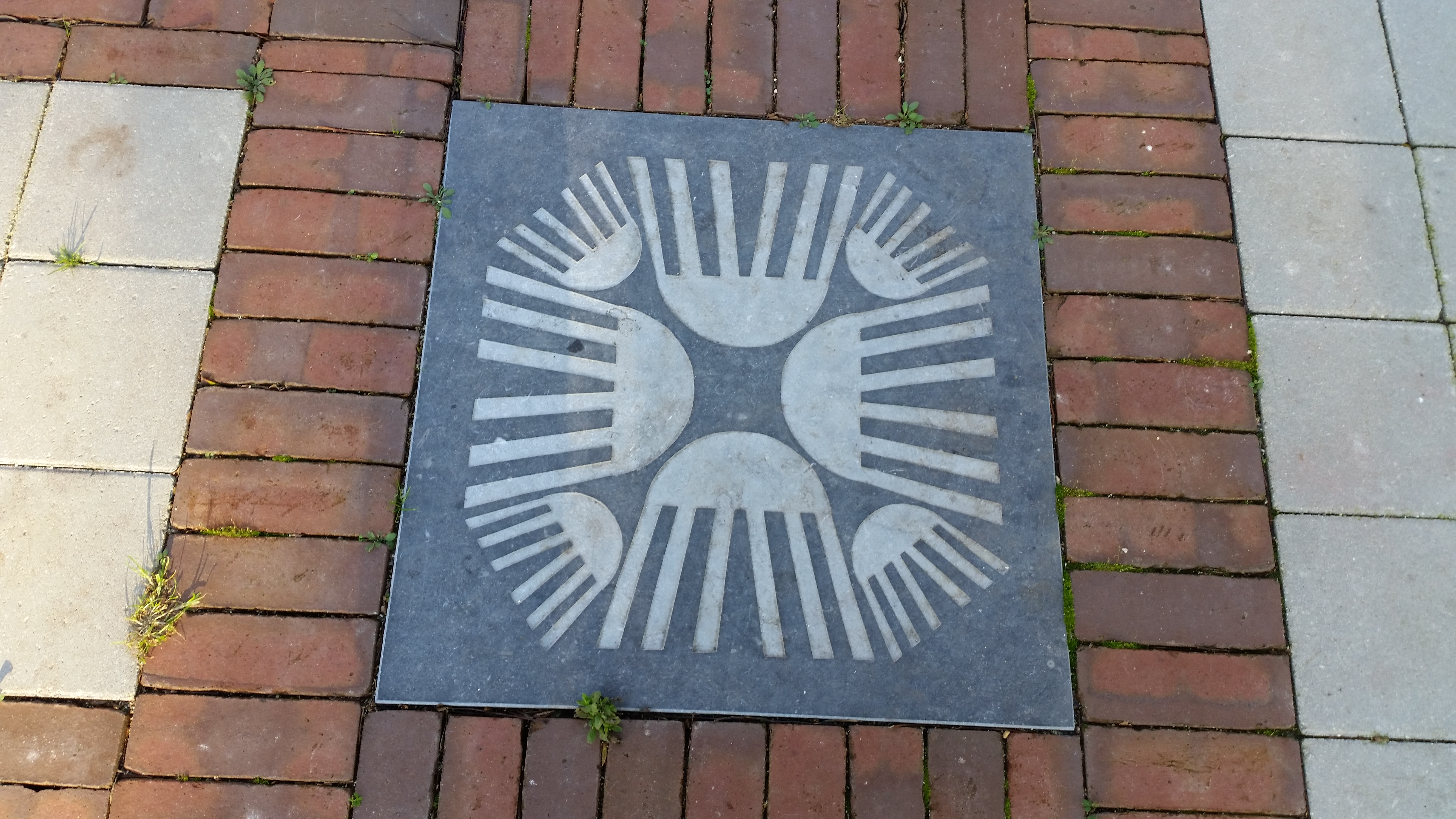 Looplijnen